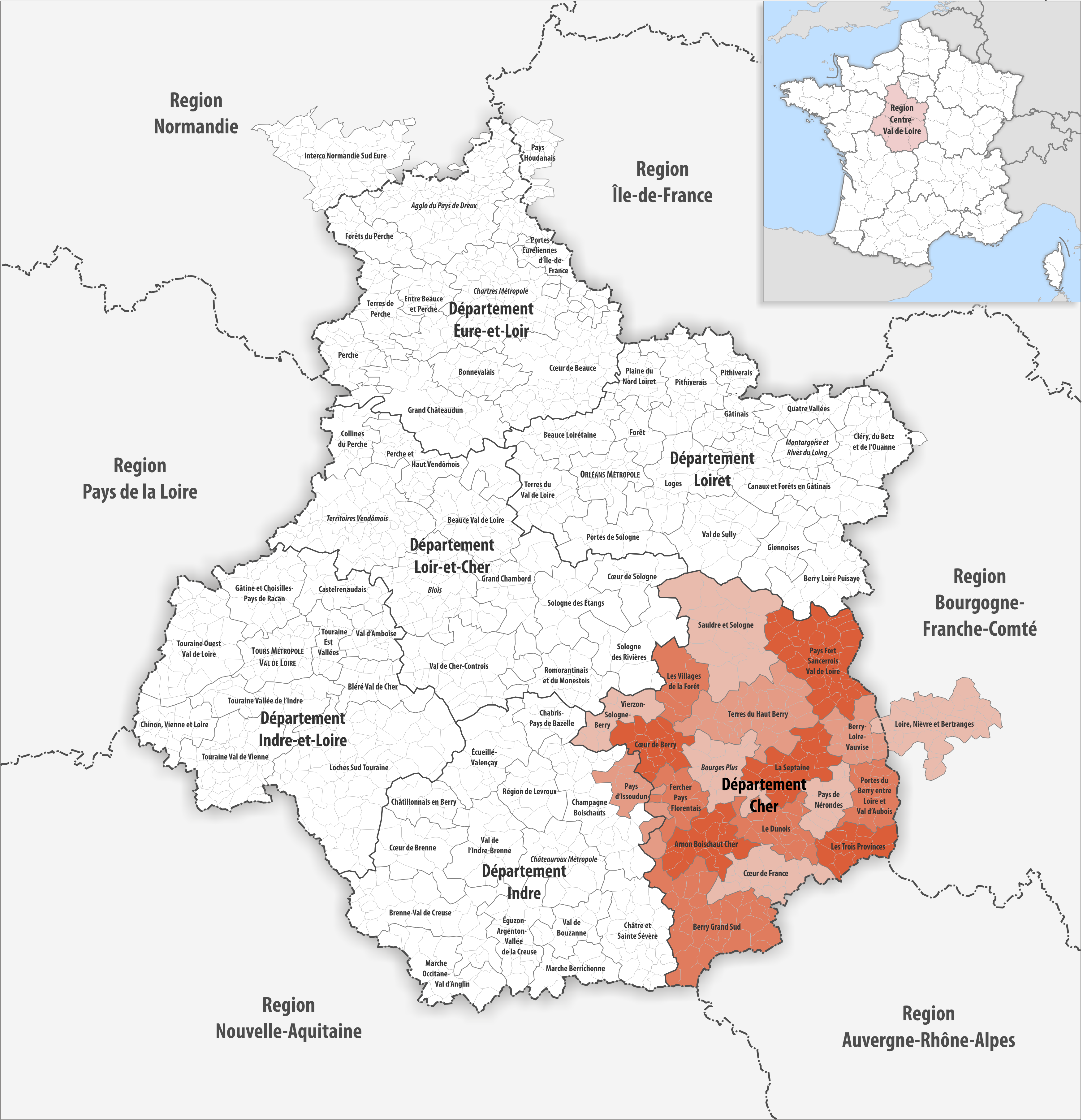 Gemeindeverbände im Département Cher